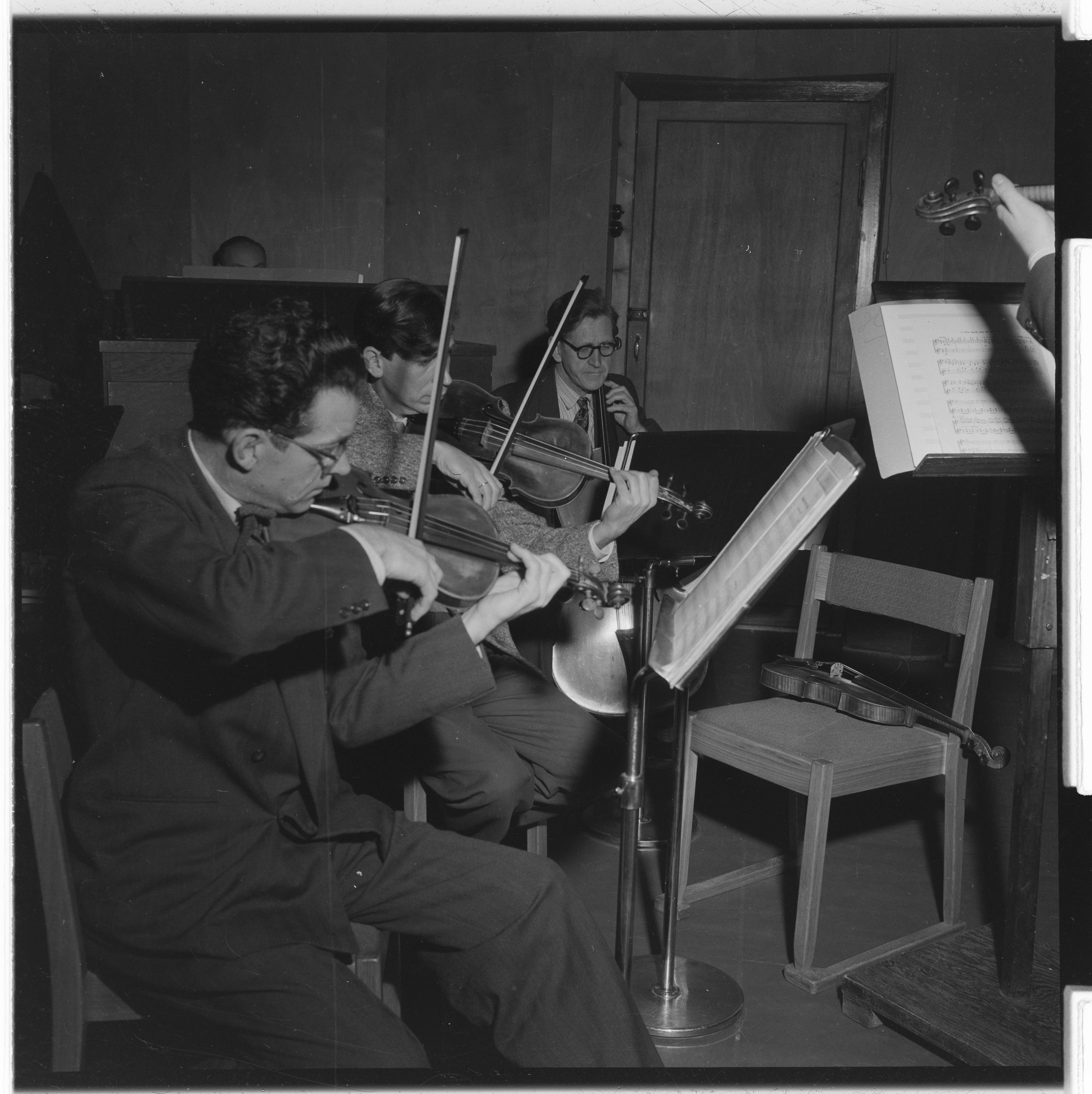 Bildet er hentet fra Arkivverket. Stavanger-ensemblet. NÅ nr. 3, 1953. Kapellmester Karsten Andersen, obo Jan Viig, fløyte Hans Schøyen, piano Nora Berge, bratsj Ragnar Borge, fiolin Arne Grønlund, bass Erling Rasmussen, harmonium Einar Ingebretsen, klarinett Einar Fredriksen, cello Aksel Wold, hallomann Andreas Thorsen. Arkivinstitusjon : Riksarkivet Arkivnavn : Billedbladet NÅ Sted : Norge, Rogaland, Stavanger, Emneord: Ensembler, Musikere Avbildet